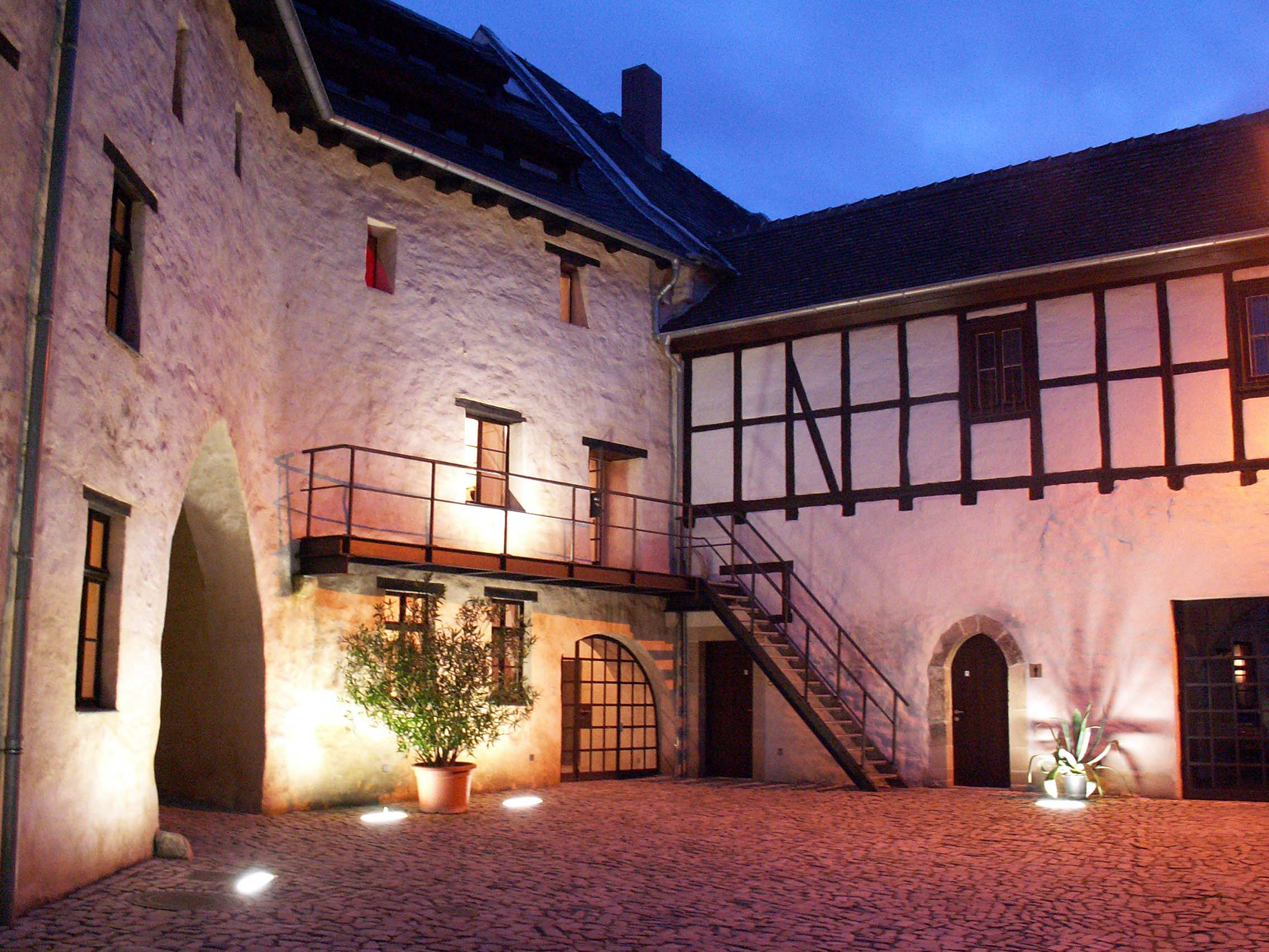 Innenhof des grauen Hofes in Aschersleben